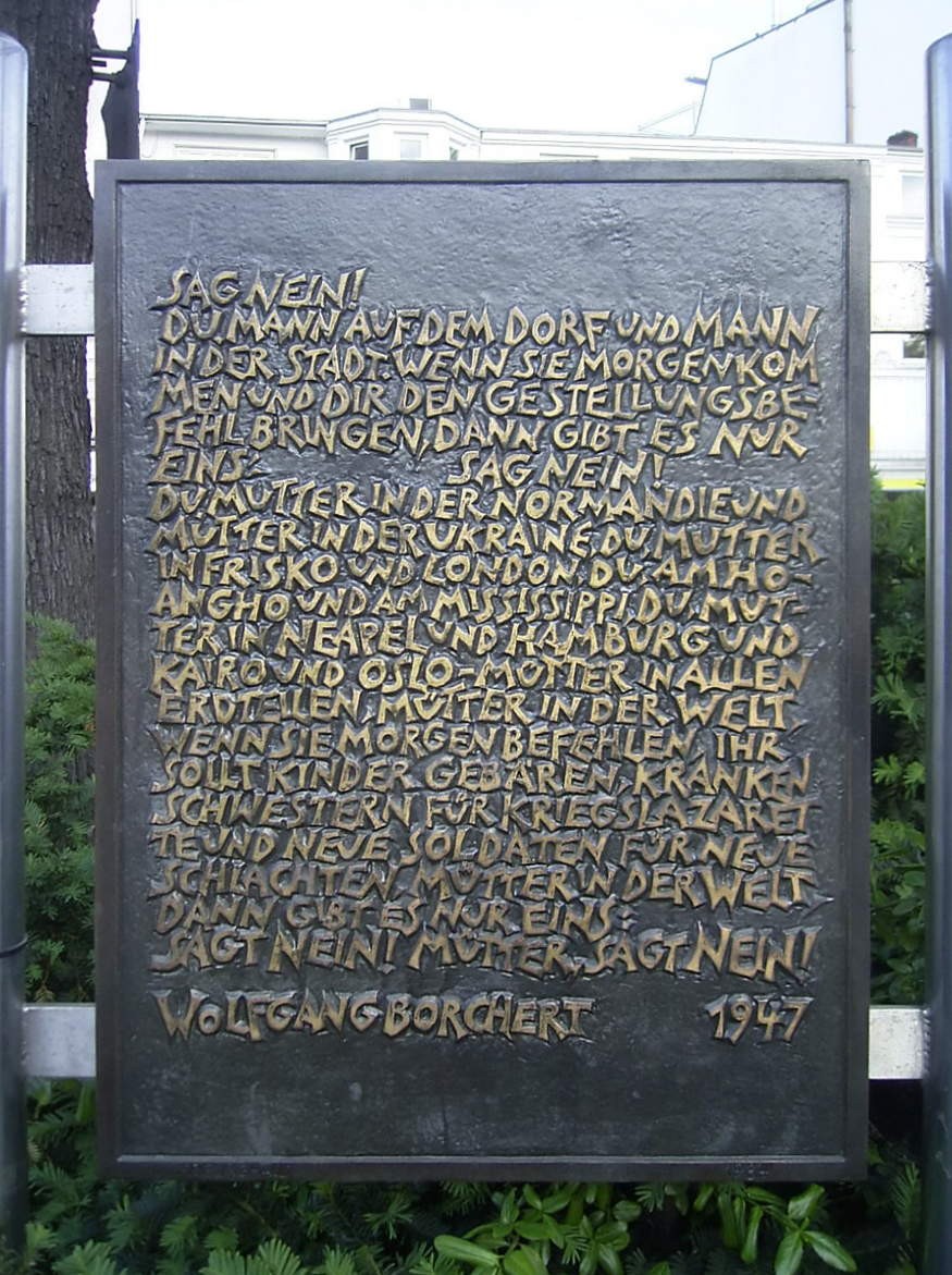 Das Gedicht "Sag nein" von Wolfgang Borchert auf einer Tafel vor der (inzwischen gefällten) Friedenseiche am Eppendorfer Marktplatz in Eppendorf.